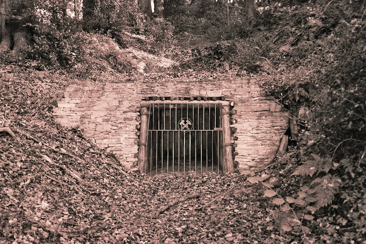 Ein Stollenmundloch des frühen Steinkohlebergbaus im Ruhrgebiet, Deutschland; Bochum?